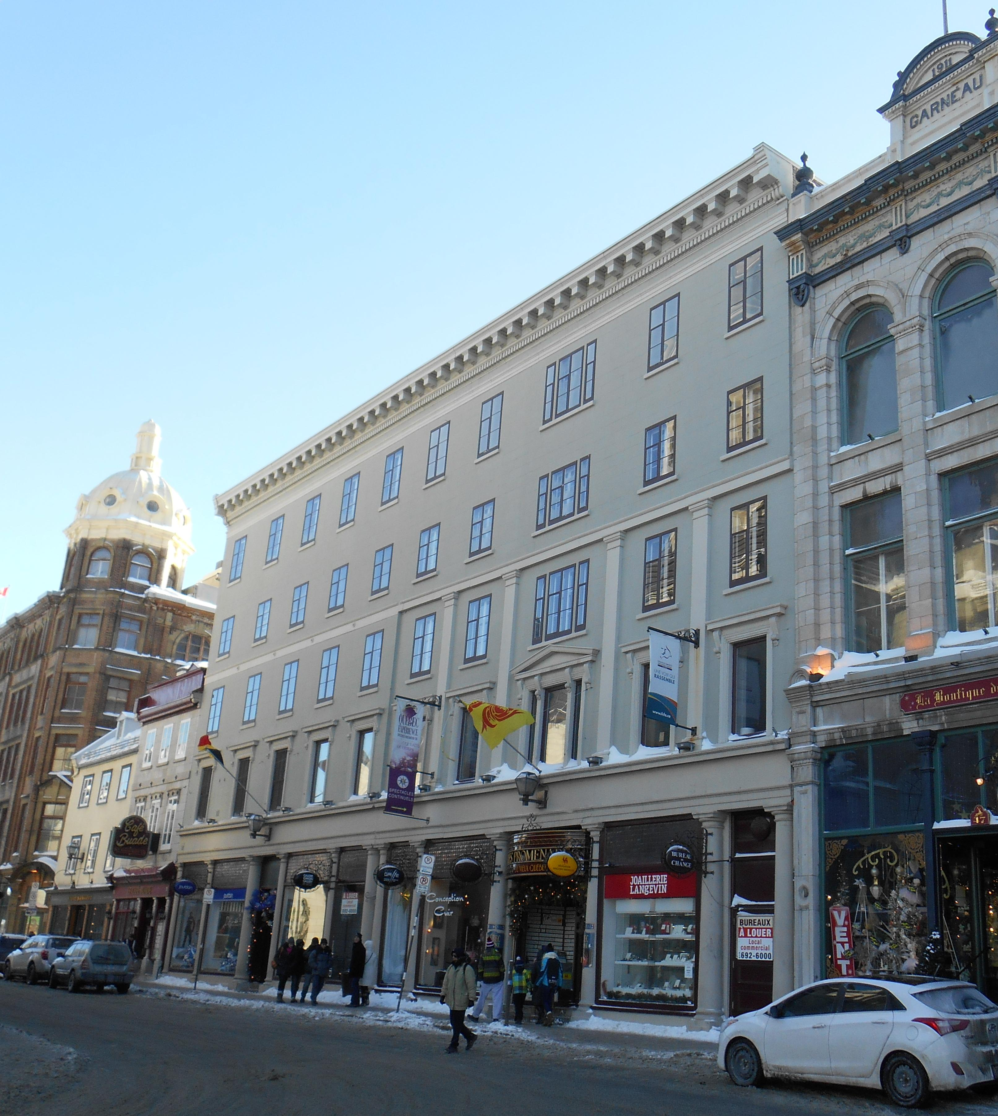 Au centre : Ancien édifice de la Holt Renfrew and Co., 35-43, rue De Buade / 8, rue du Trésor, Québec, construit en 1849 Il accueille aujourd'hui « Les Promenades du Vieux-Québec ».